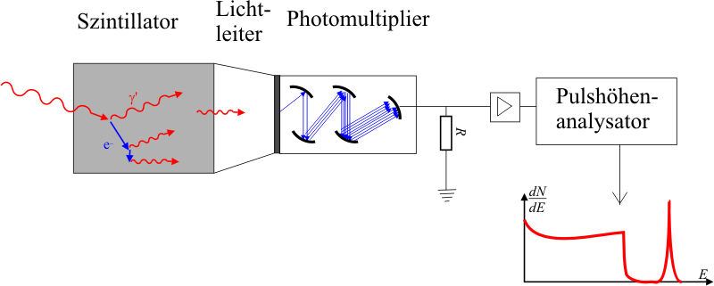 Szintillationszähler